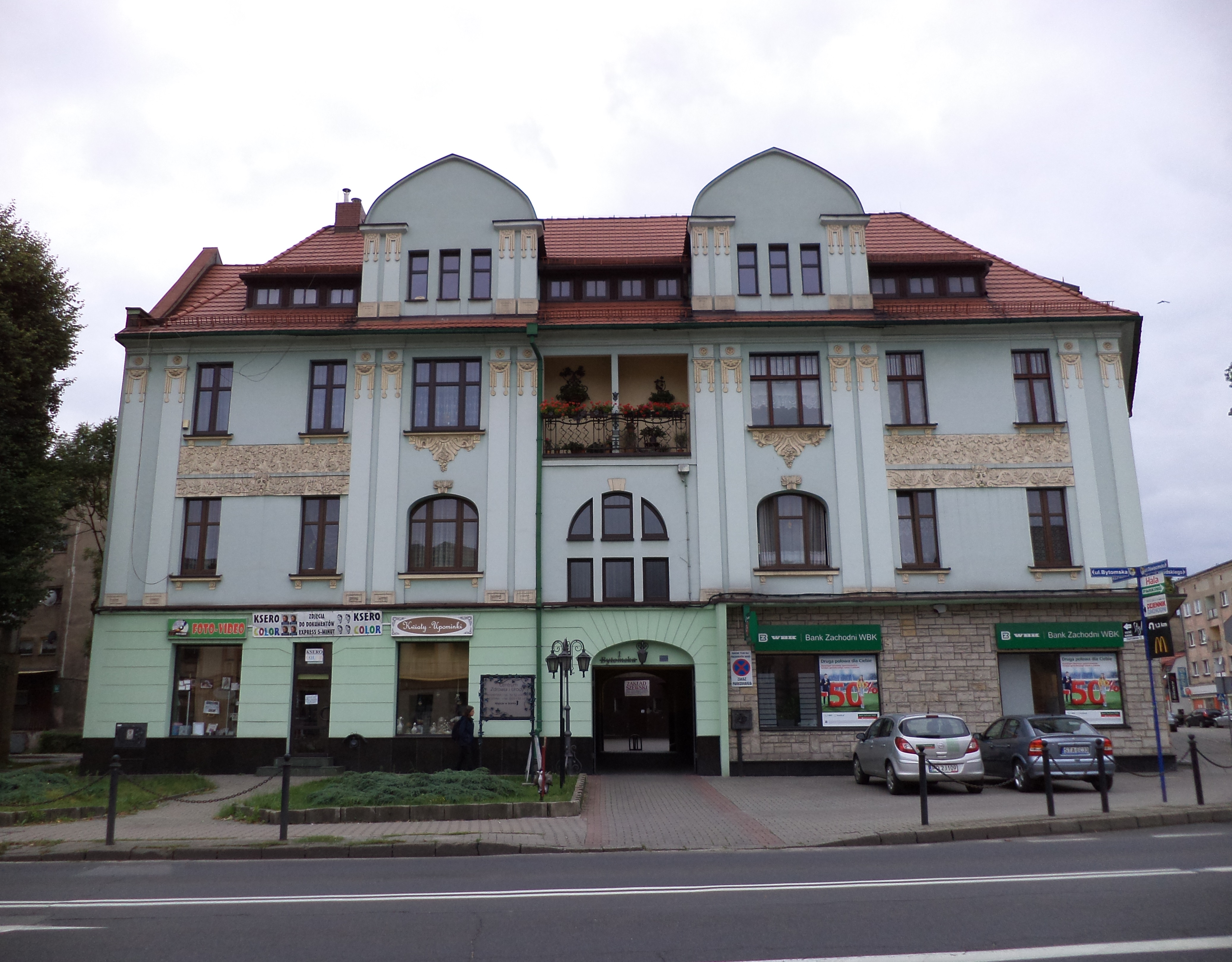 Zabytkowy budynek przy ulicy Bytomskiej 1 w Tarnowskich Górach